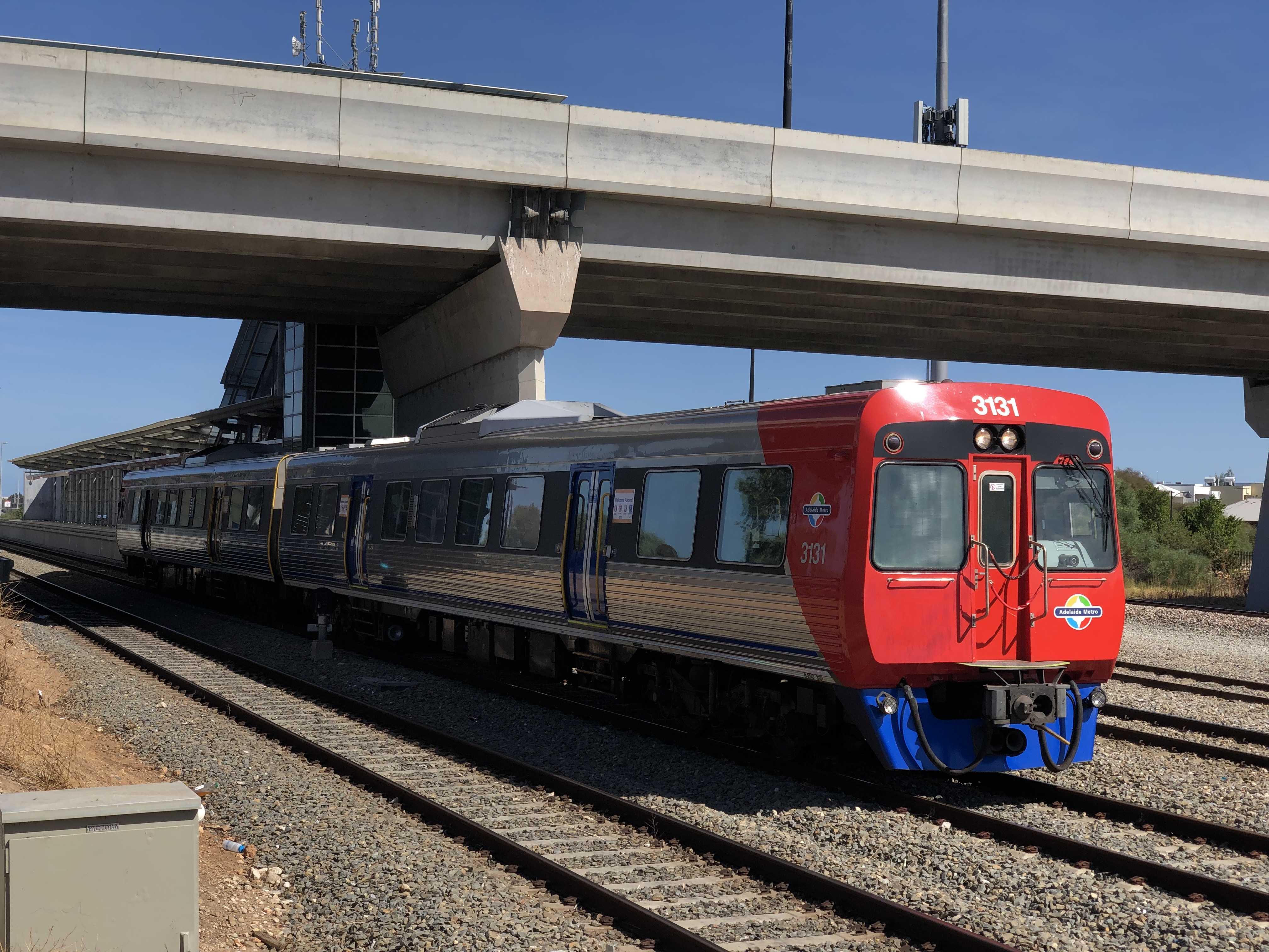 中文（香港）: 阿德萊德都會交通鐵路3000形（第三代塗裝）離開摩臣公共運輸交匯處